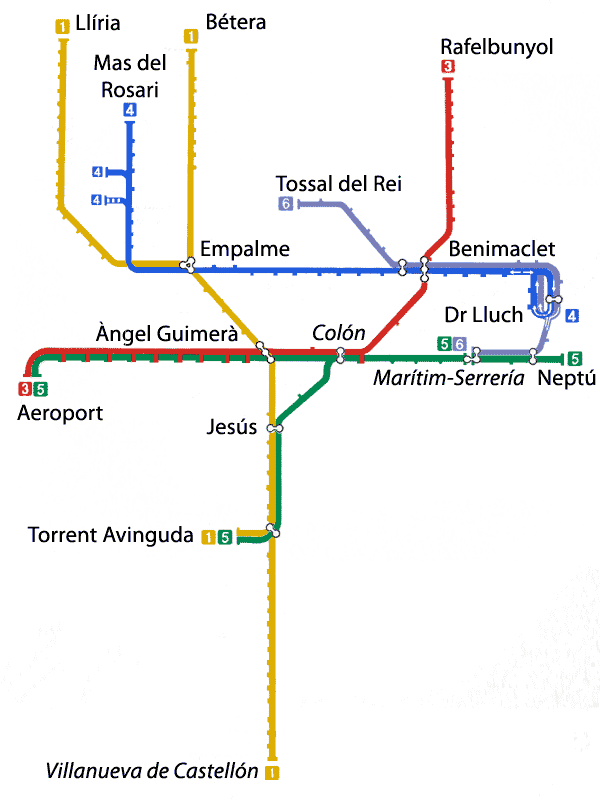 Plànol de Metrovalencia (línies 1-6)